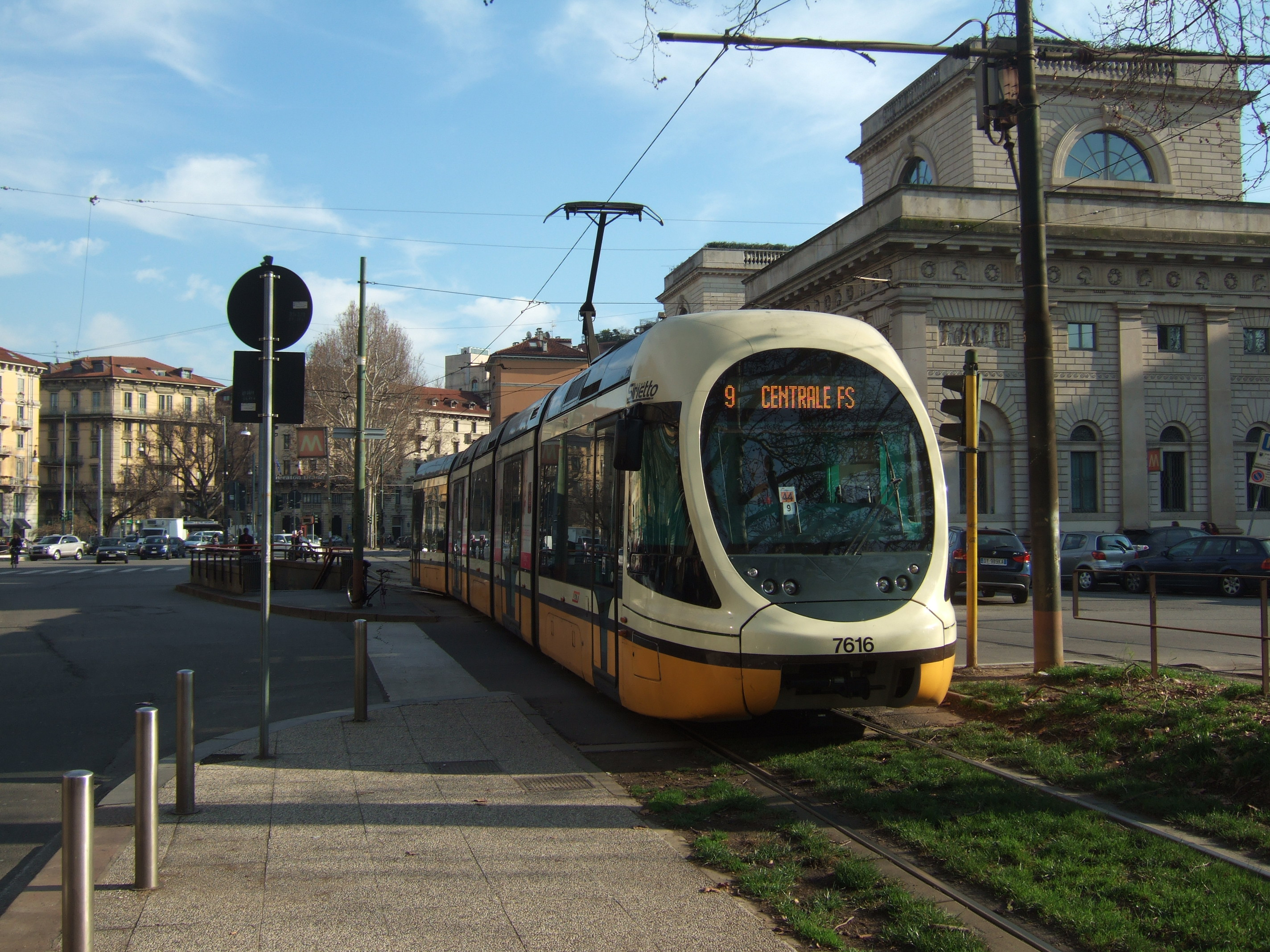 Vettura tranviaria 7616 dell'ATM di Milano in piazza Oberdan